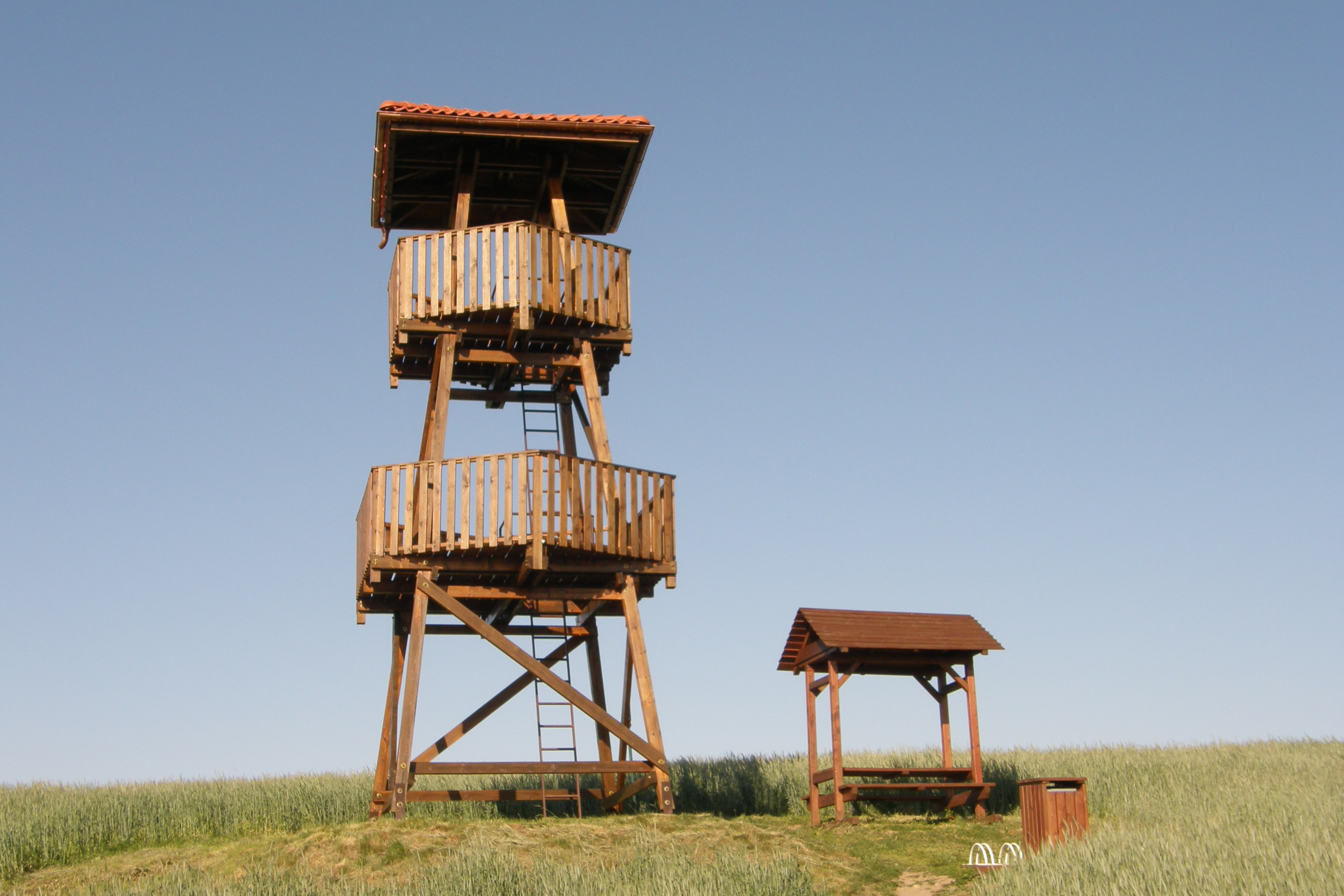 Rozhledna Zelenkův kopec u obce Ústup v okrese Blansko